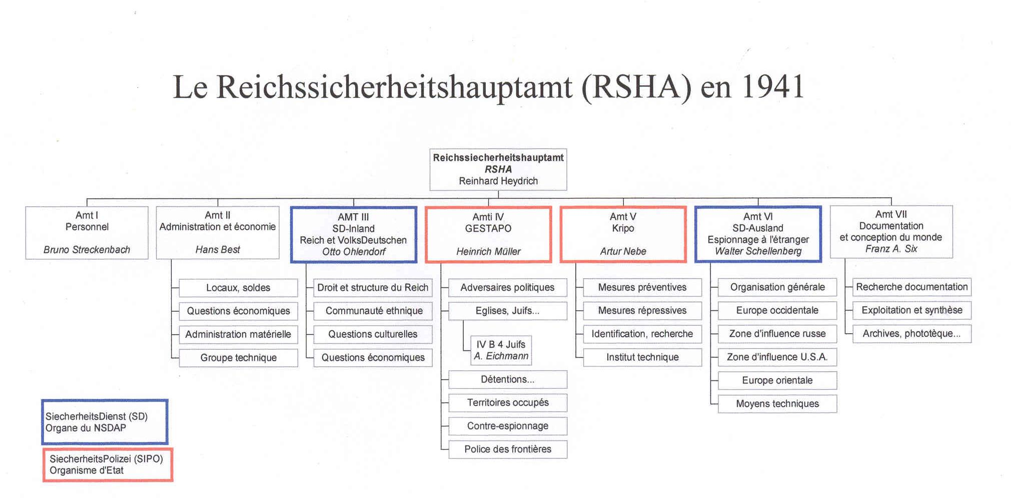 Organigramme du RSHA en 1941